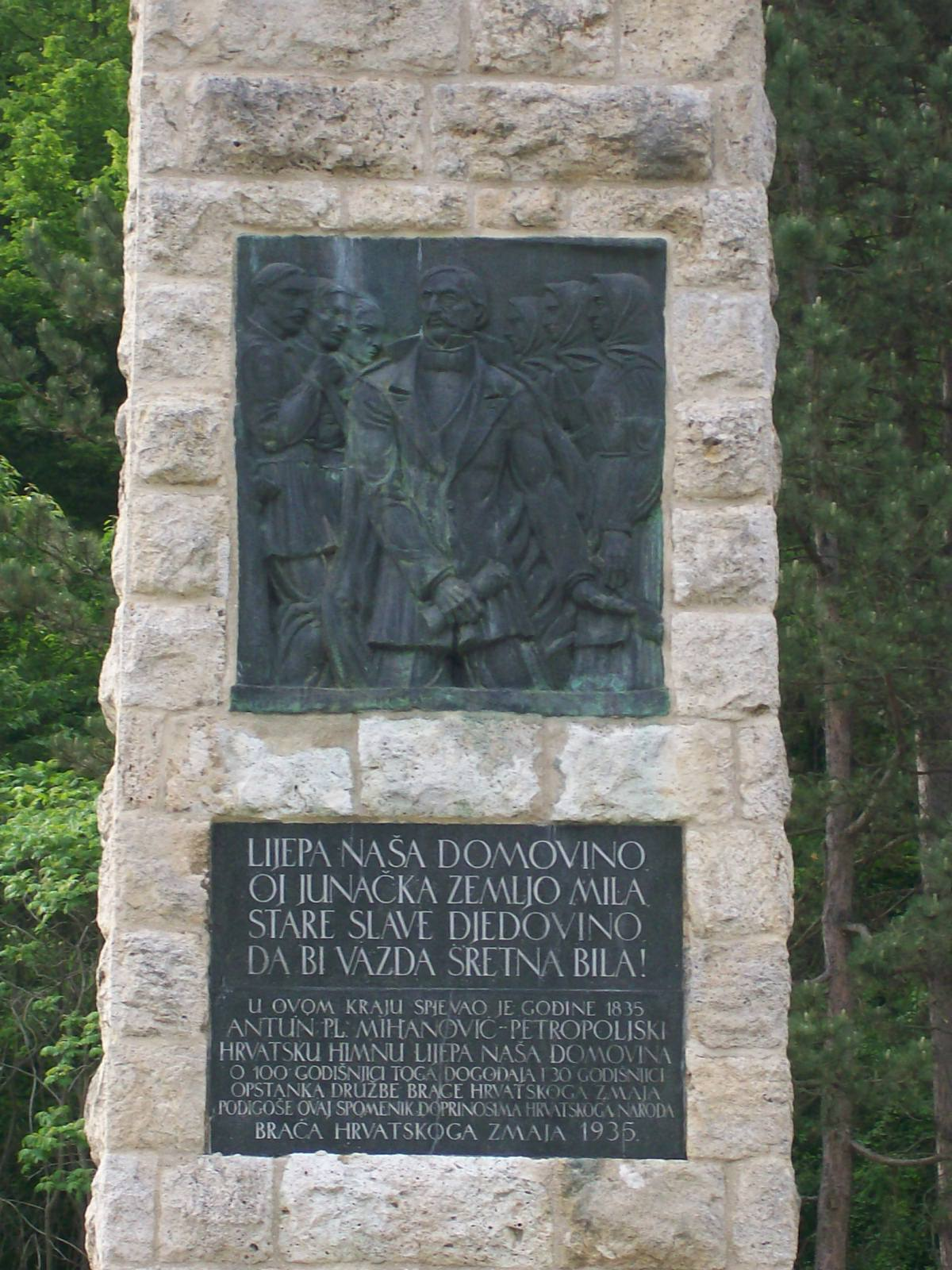 Natpisna ploča i reljef koji prikazuje Antuna Mihanovića na Spomeniku hrvatskoj himni "Lijepa naša" u Zelenjaku, na cesti Klanjec-Kumrovec.